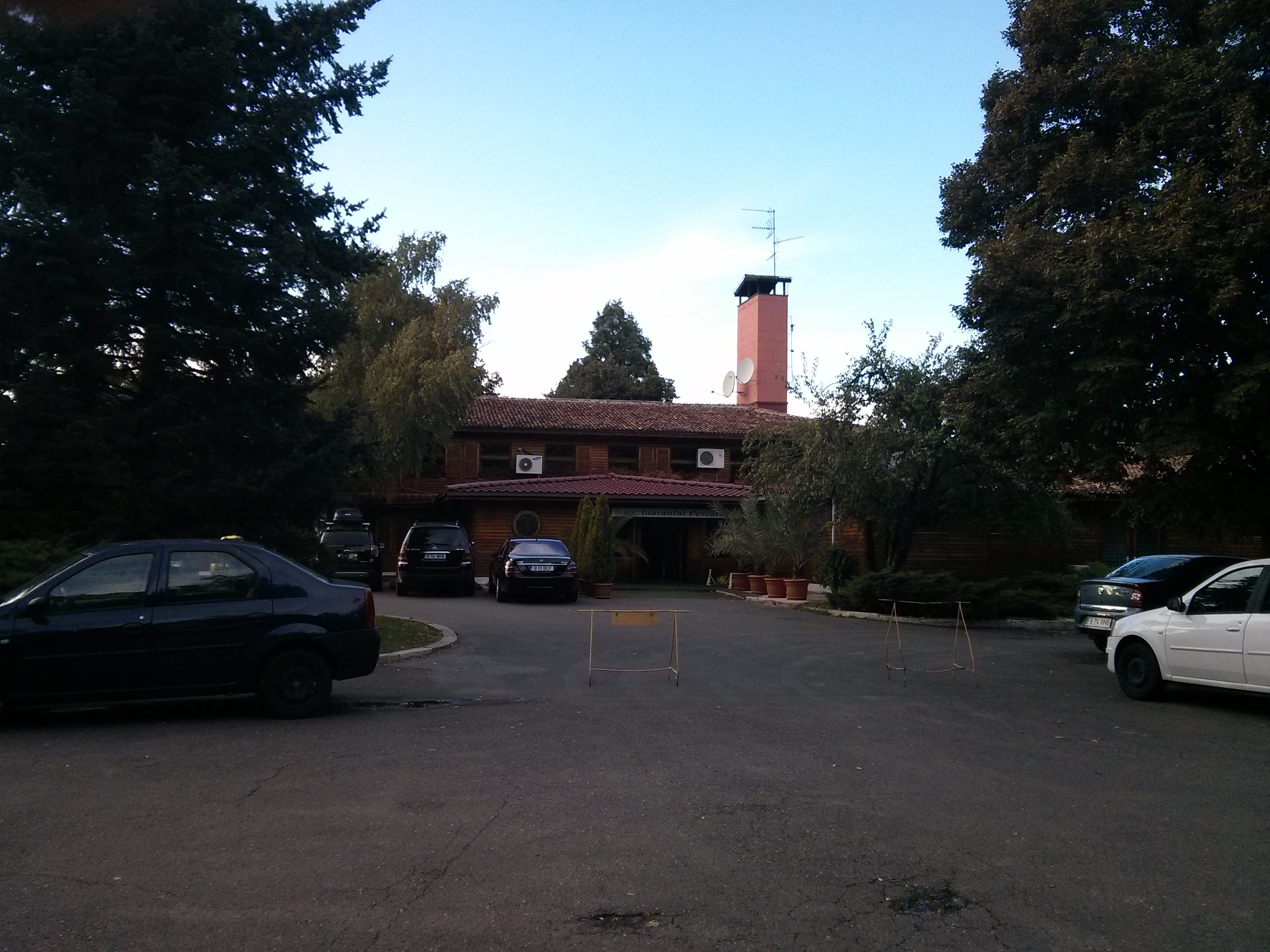 Restaurantul "Pescăruș"